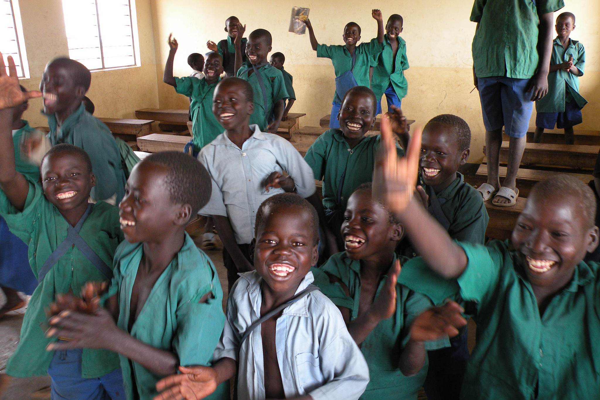 USAID.